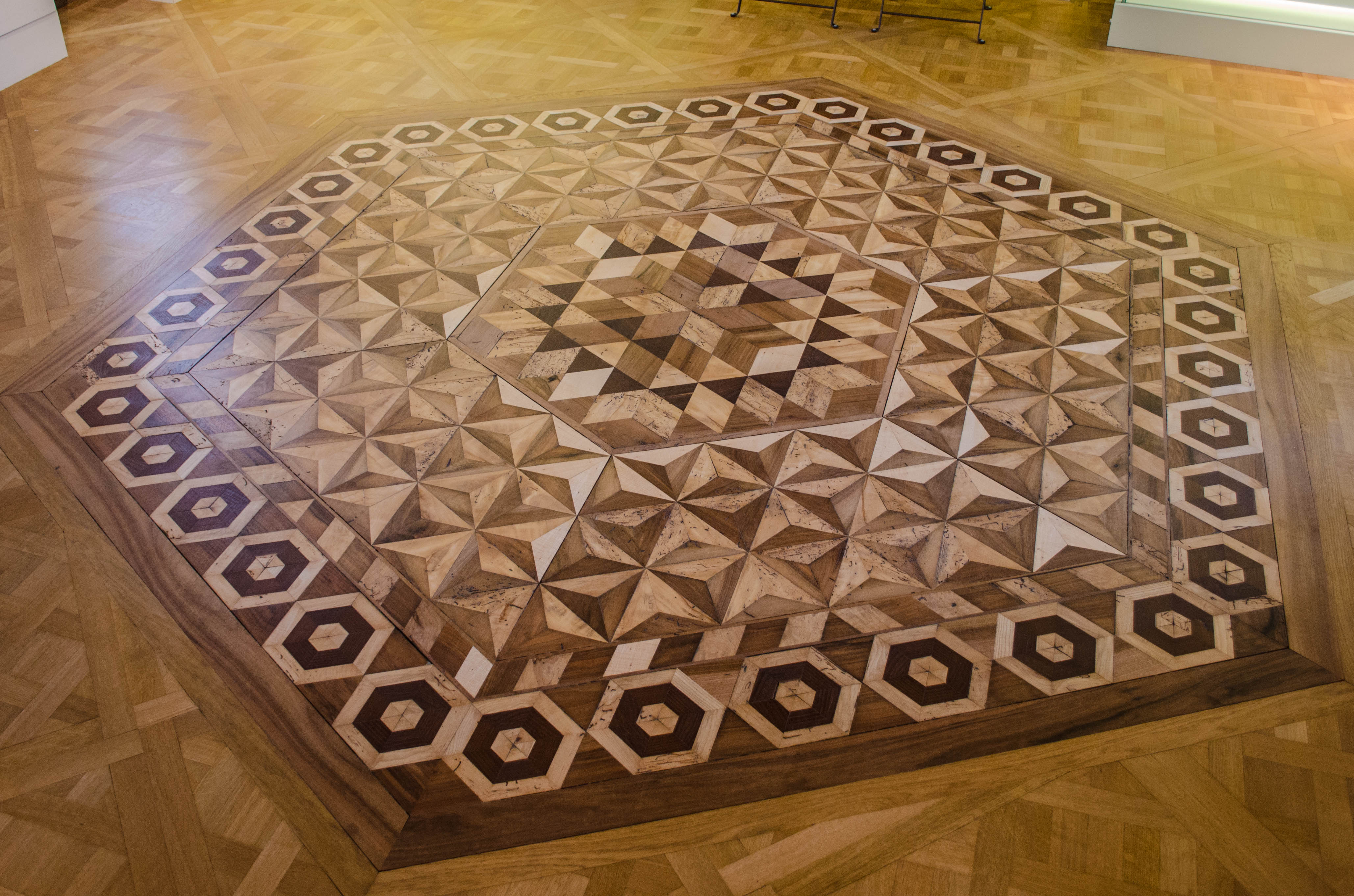 Valence, Drôme, France. Musée des beaux-arts : parquet d’une des salles